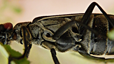 Ausschnitt Unterseite von Epicauta rufidorsum, Derivate von Epicauta rufidorsum 02.JPG